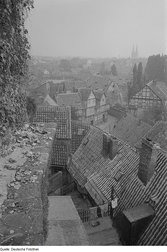 Original image description from the Deutsche Fotothek Quedlinburg. Blick über die Dächer der Altstadt